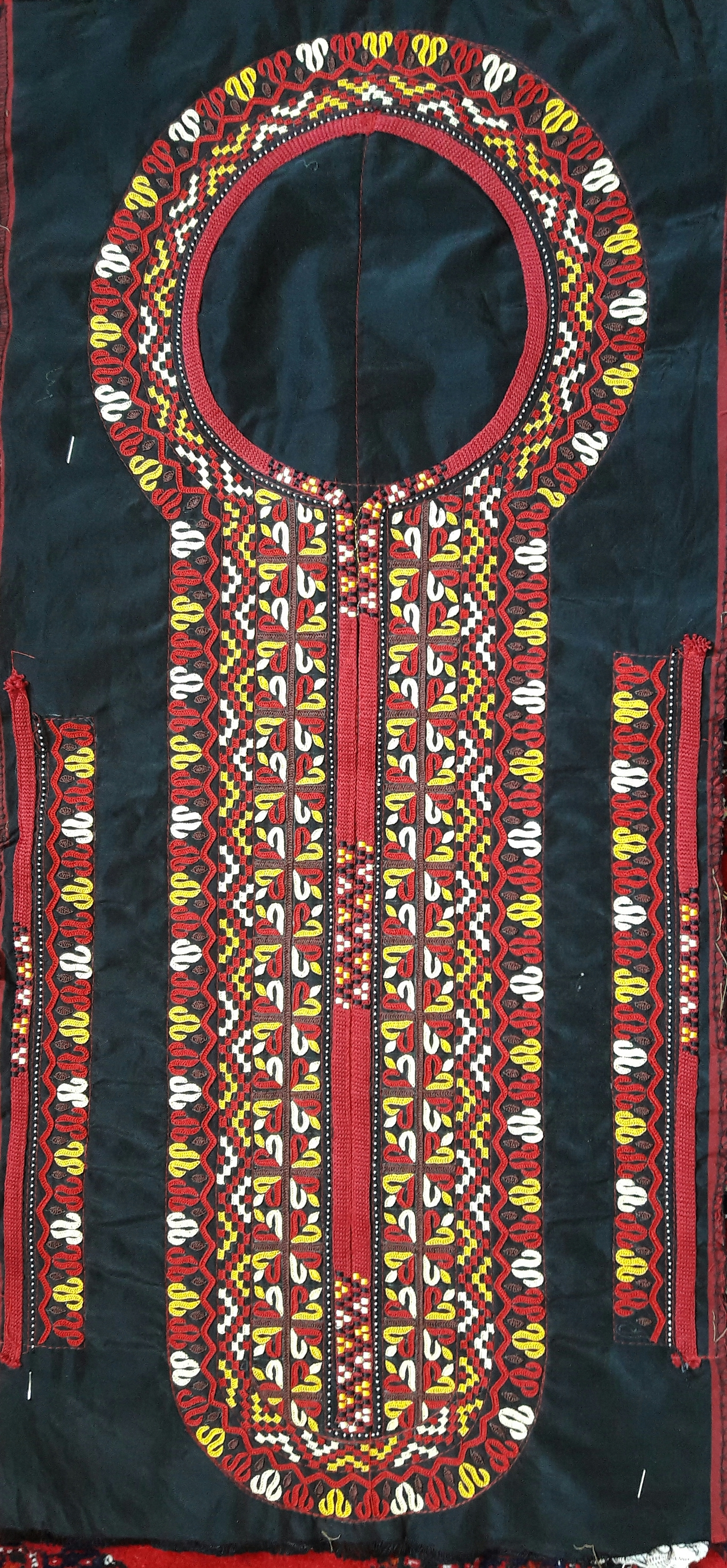 Traditional turkmen embroidery for women's dress